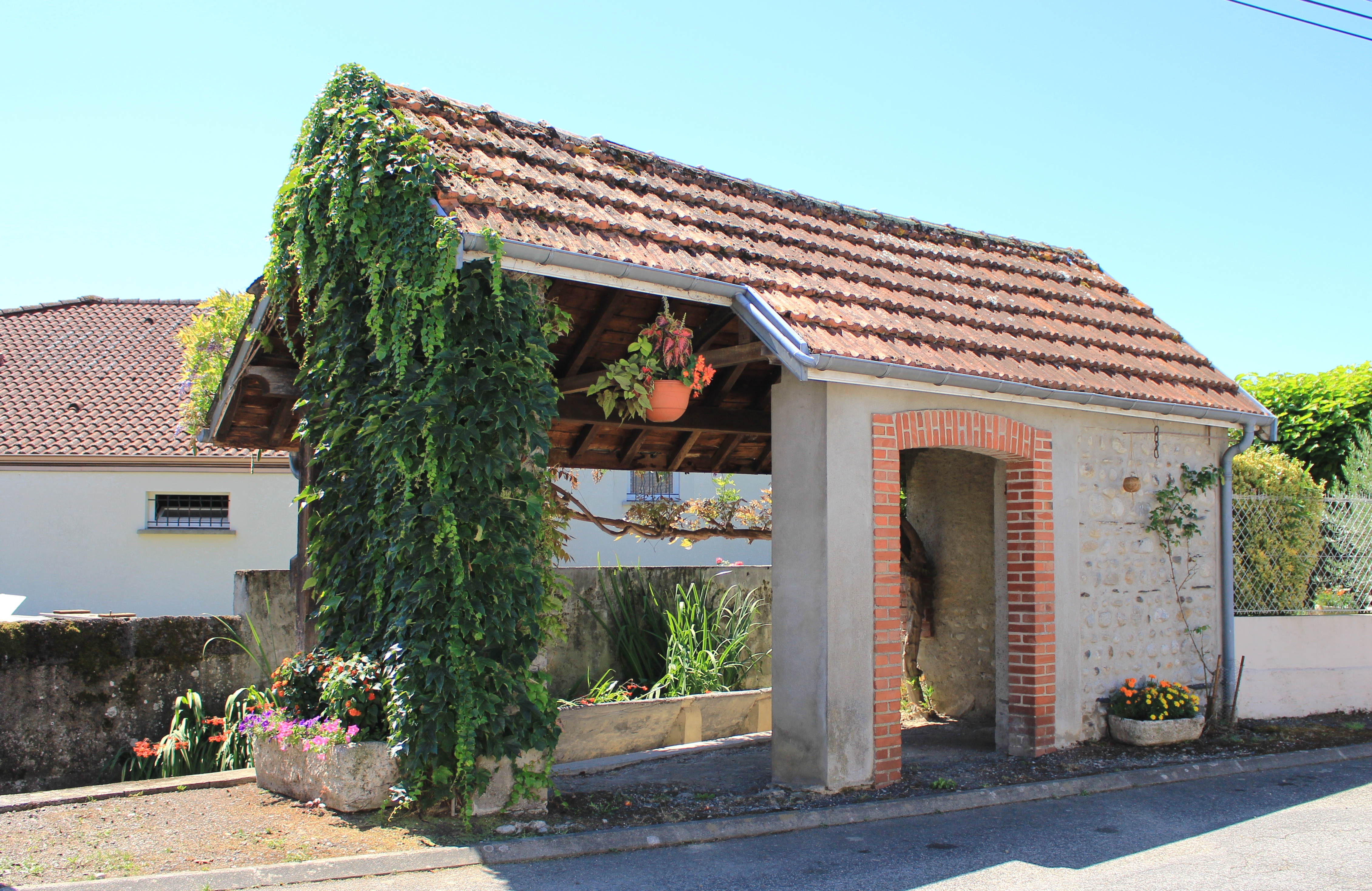 Lavoir de Séméac (Hautes-Pyrénées)